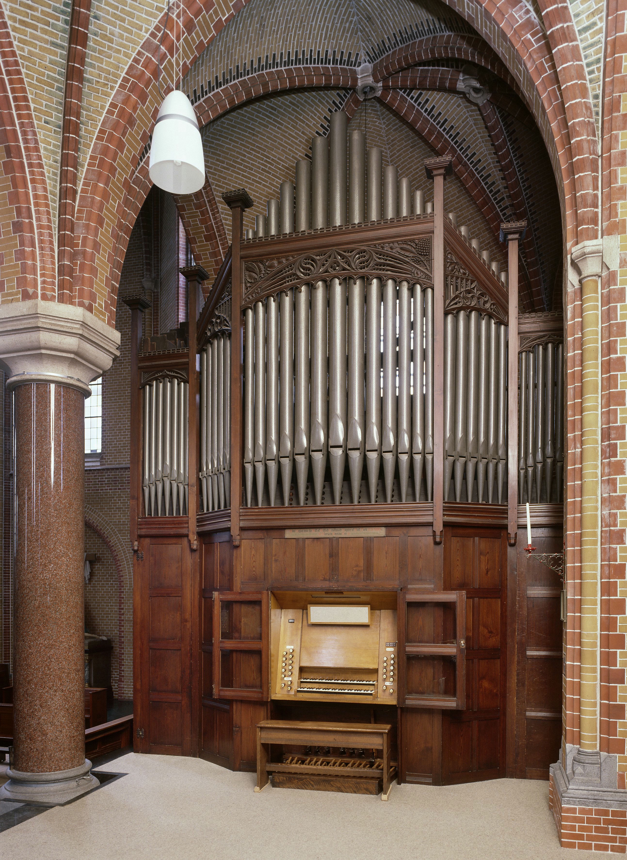 Rooms-katholieke Sint-Jan de Doper: Interieur, aanzicht orgel, orgelnummer 1836 (opmerking: Gefotografeerd voor Het Historische Orgel in Nederland 1878-1886, Bladzijde 122)